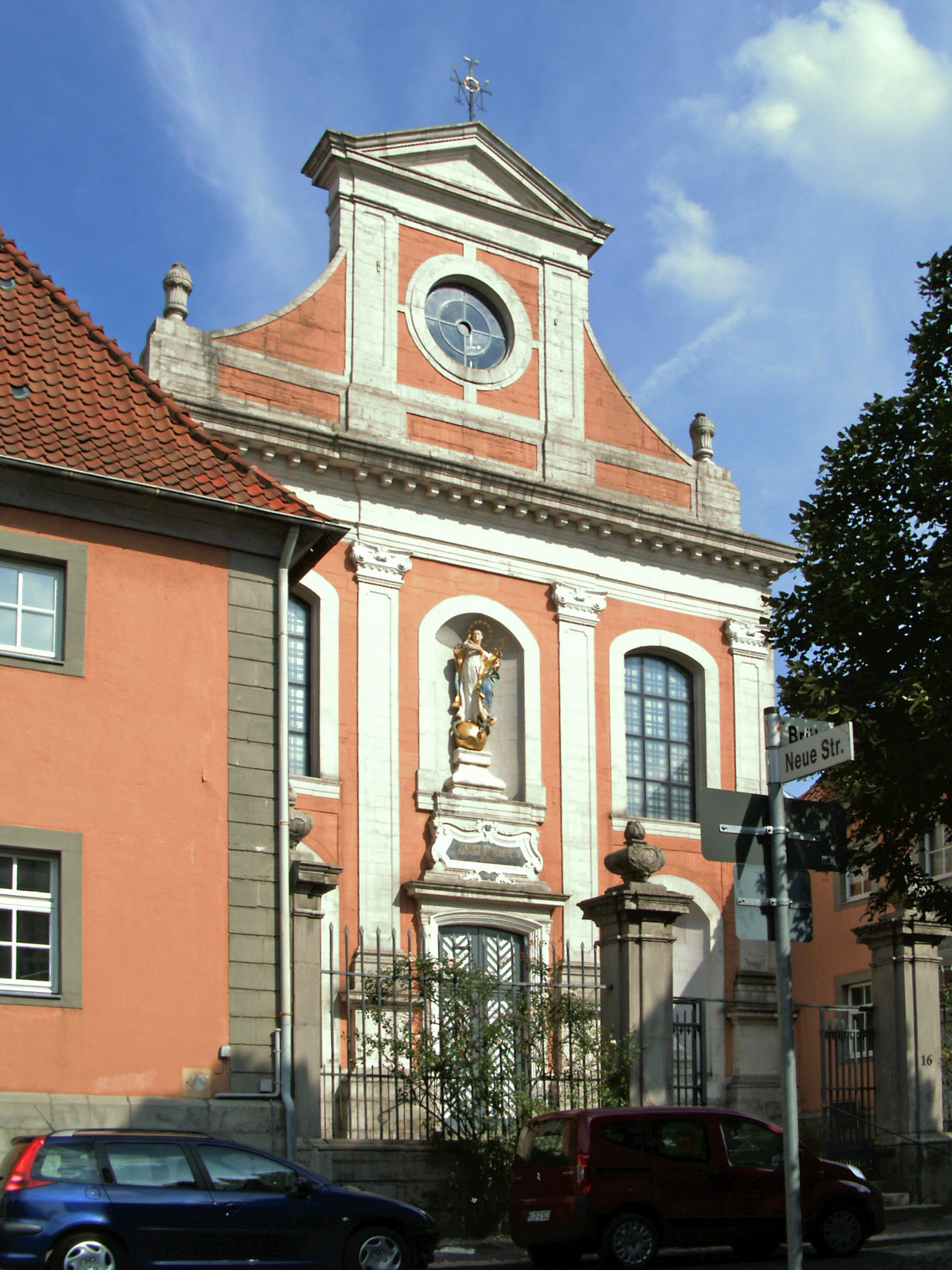 Katholische Seminarkirche in Hildesheim